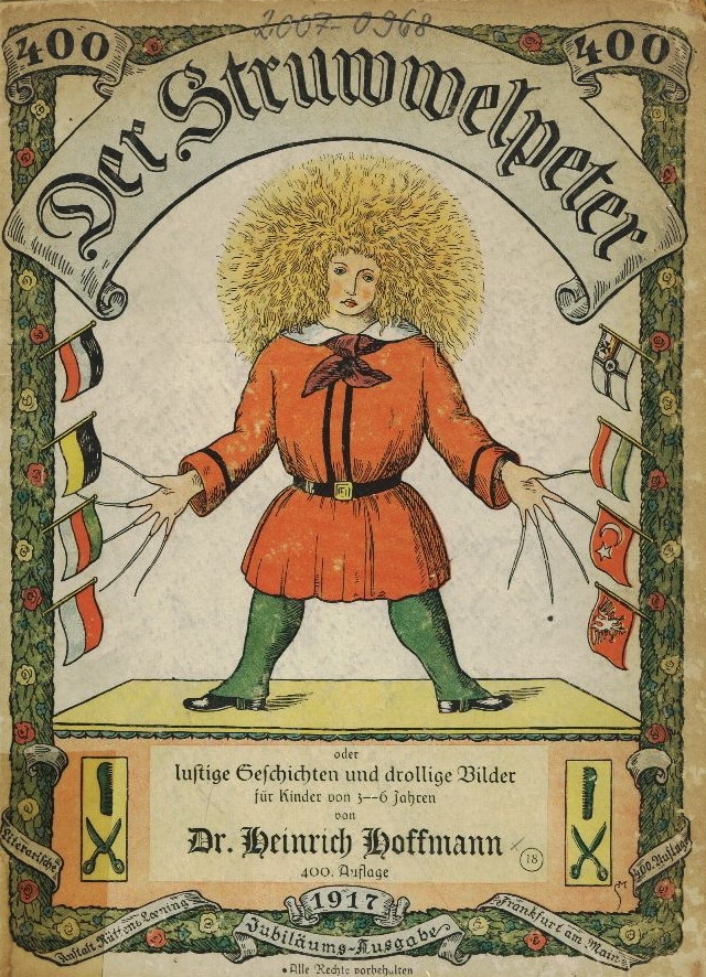 Der Struwwelpeter: Buchdeckel vorn